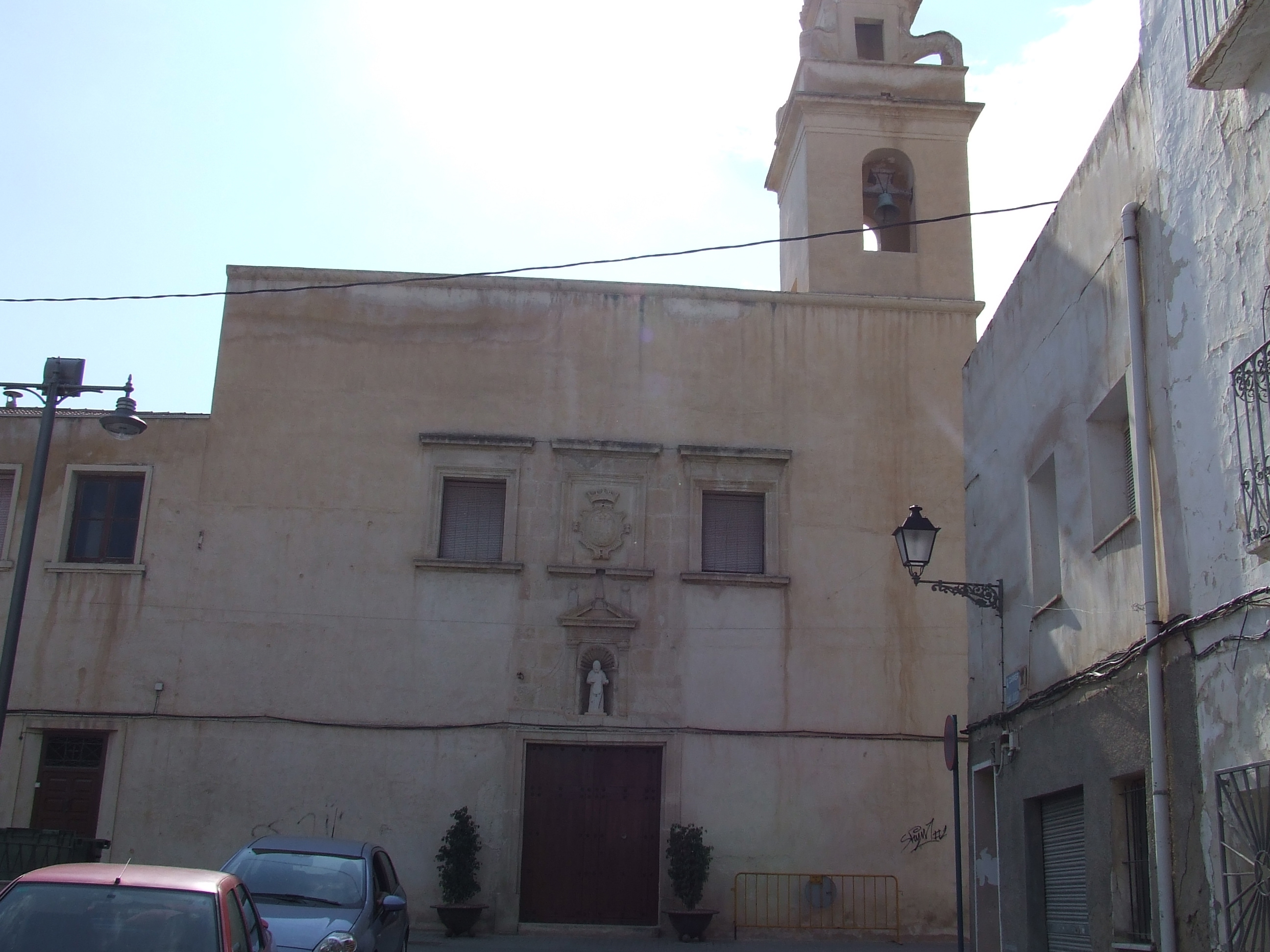 Fachada del San Francisco de Mutxamel